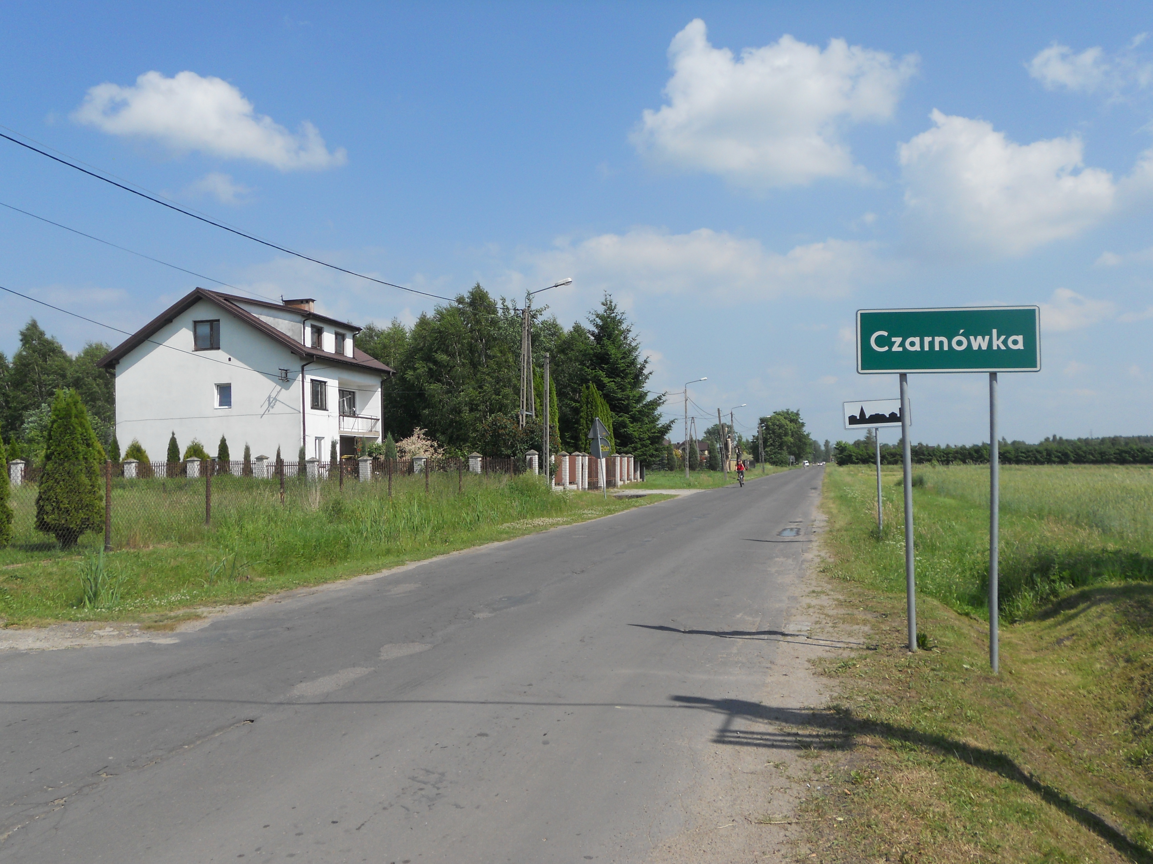 Wieś w gminie Wiązowna